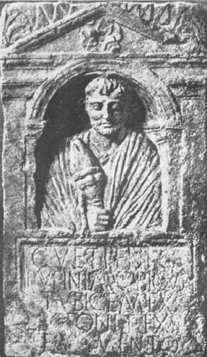 Tombstone of C. Vetienus Urbiqus